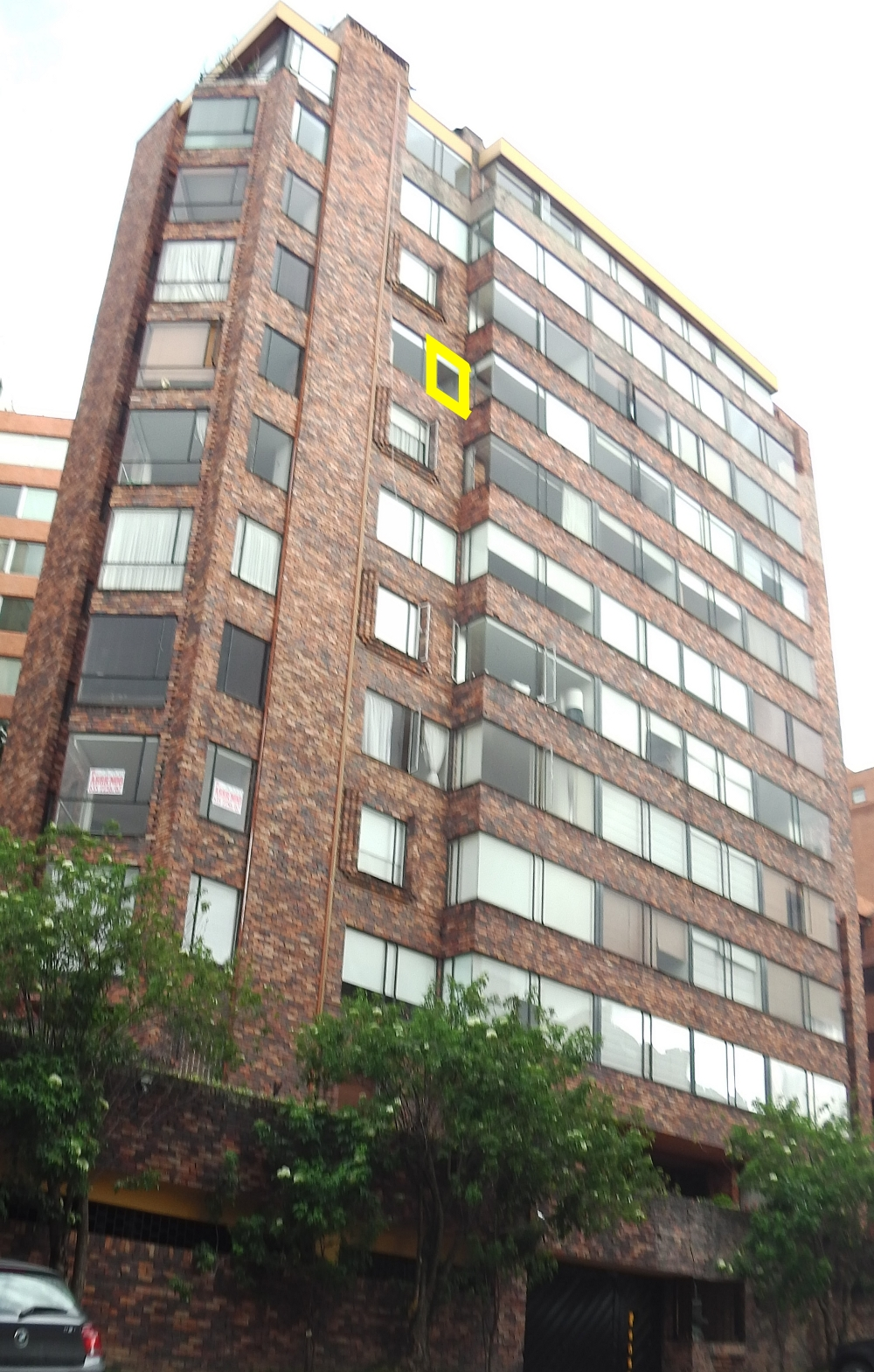 Edificio Altos del Portal en Bogota Colombia.